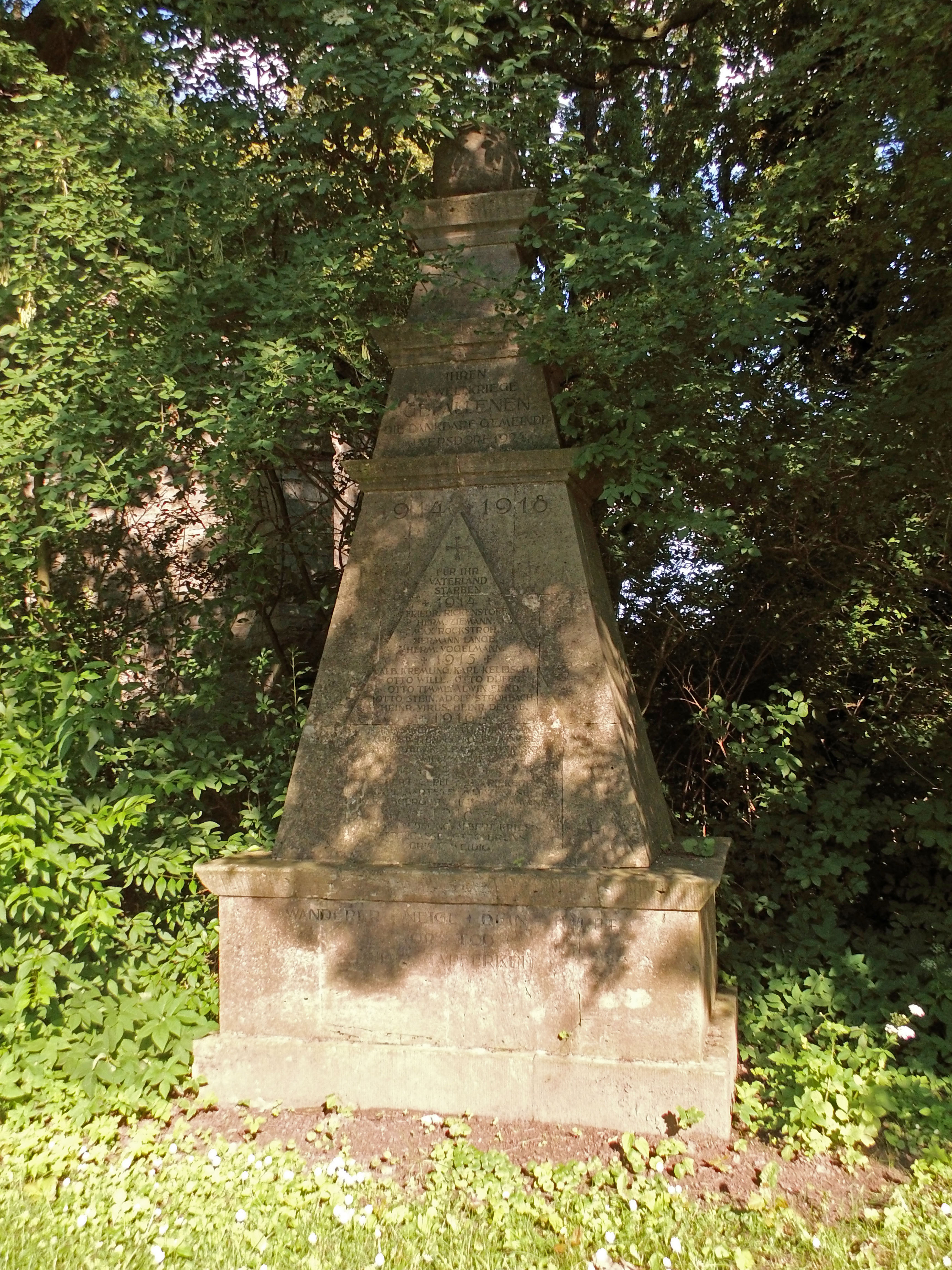 Denkmal für die im ersten Weltkrieg Gefallenen und Vermißten der Gemeinde Alversdorf, an seinem heutigen Standort auf dem Friedhof von Esbeck (Landkreis Helmstedt)